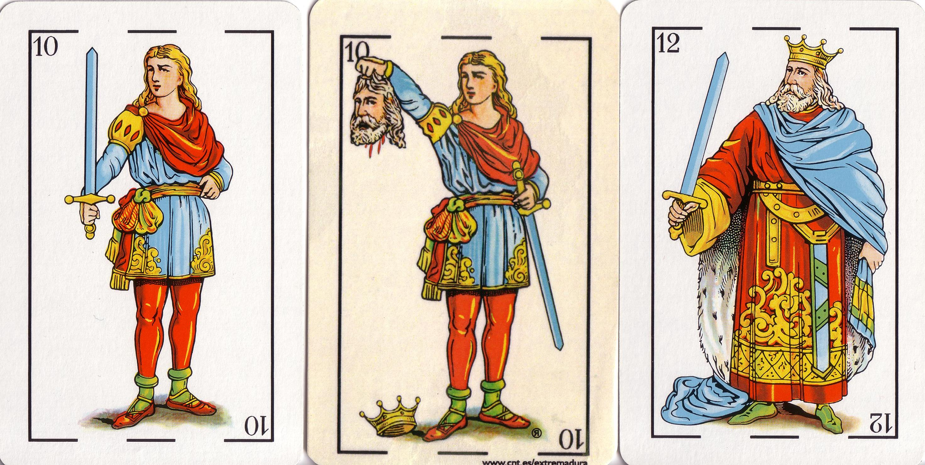 fanto kaj regxo